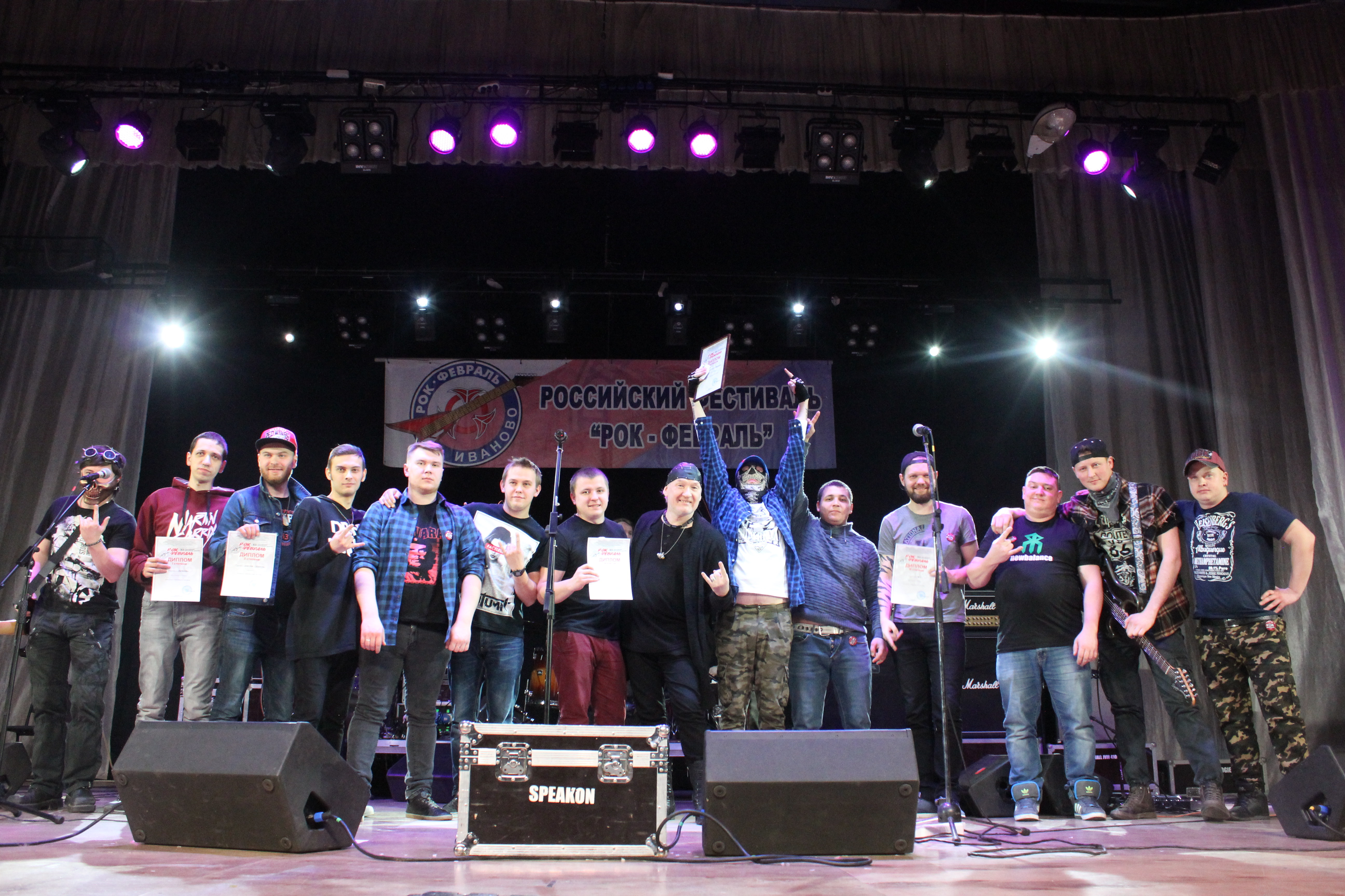 Награждение участников всероссийского фестиваля "Рок-Февраль 2018"